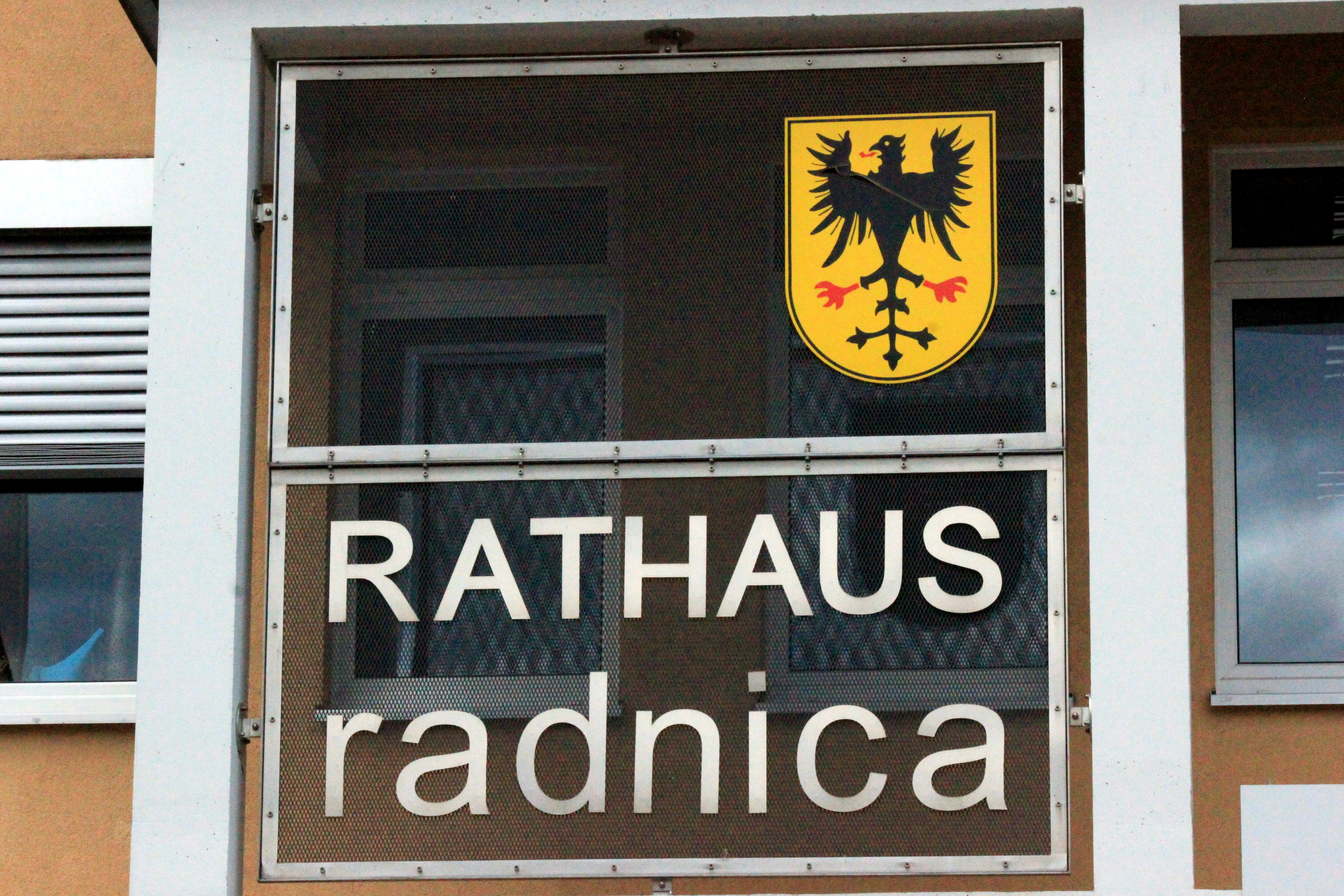 Hornjoserbsce: Dwurěčny napis při radnicy w Lubinje.